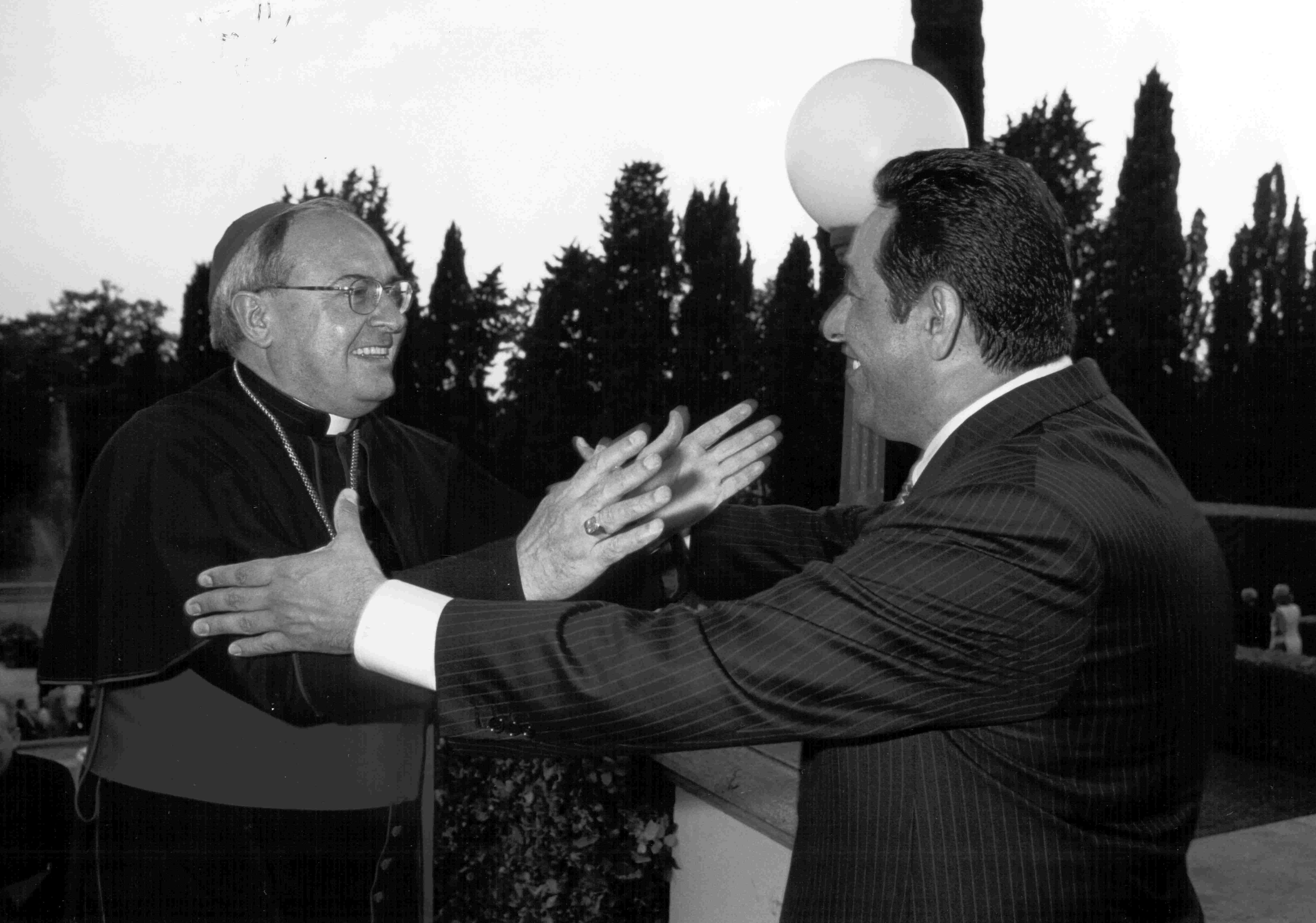 Leonardo Sandri e Ignacio Quintana en la Fiesta Nacional de Venezuela, el 5 de julio de 2001, Roma